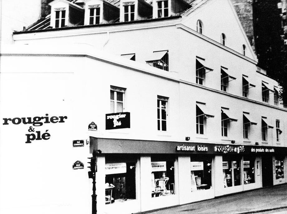 Magasin Rougier & Plé, 13-15 bd des Filles du Calvaire Paris III° (vers 1960)